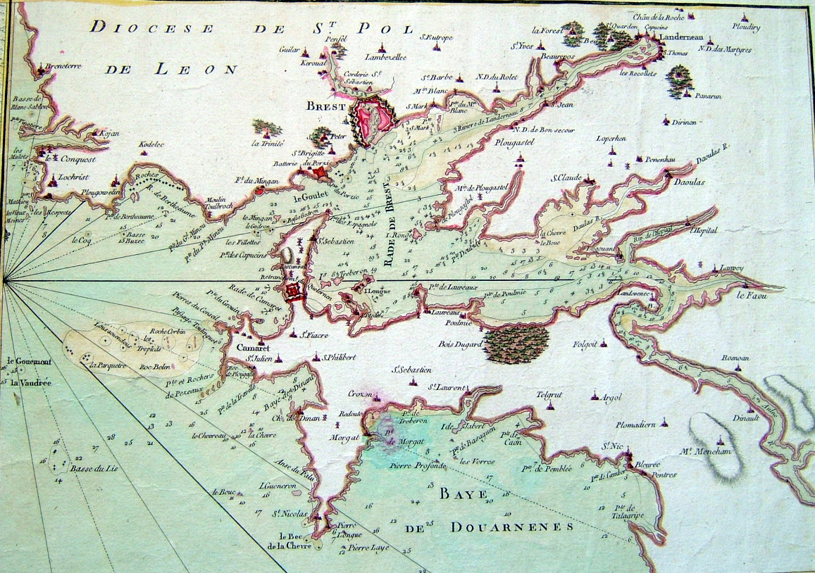 Carte de la rade de Brest de de la presqu'ile de Crozon en 1779